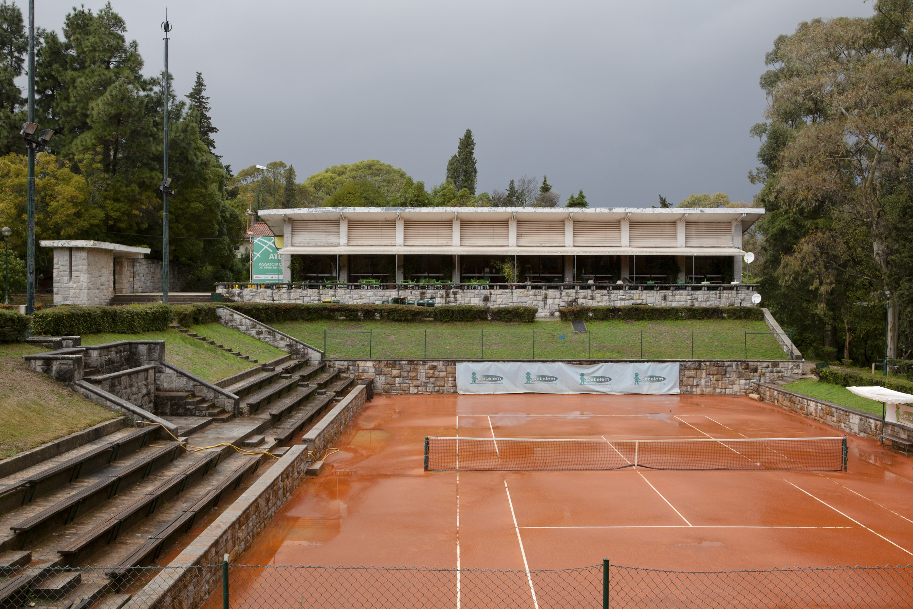 Restaurante; Clube de ténis de Monsanto; Arq. Keil do Amaral